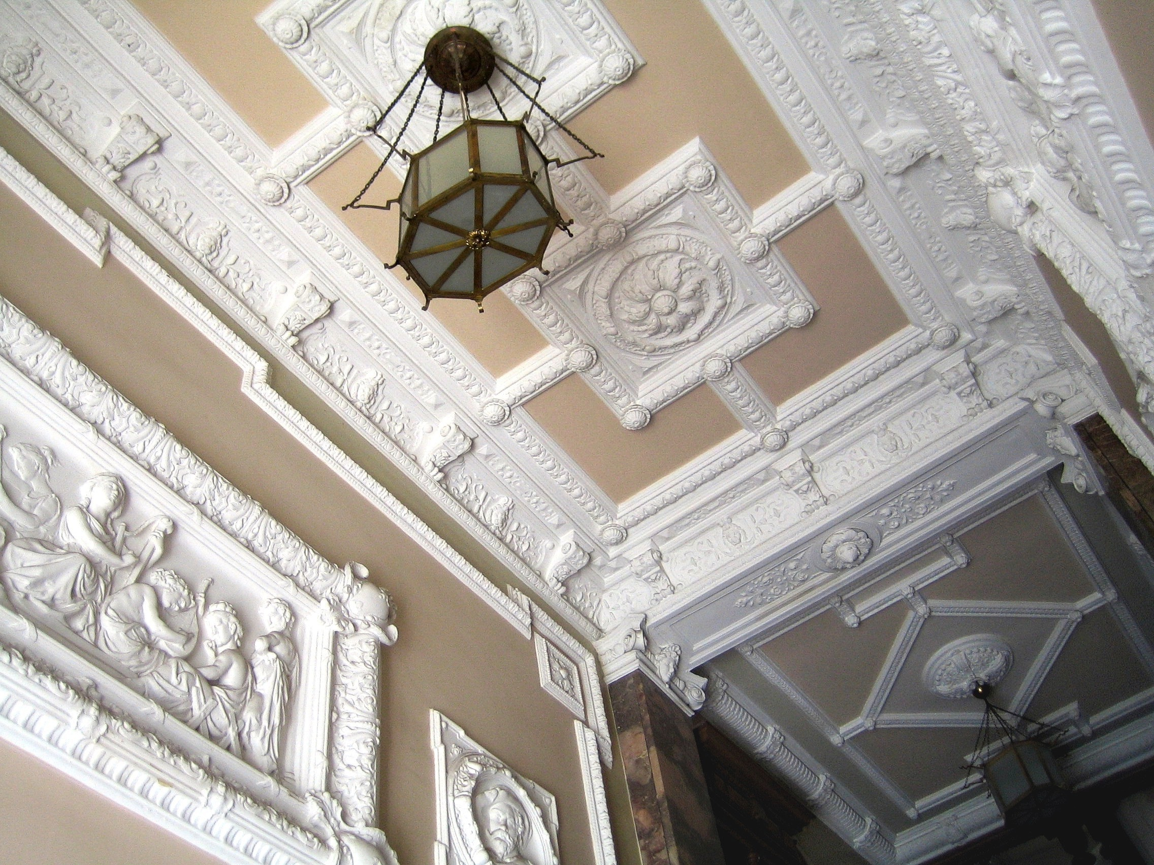 Stuckdekoration im Eingangsbereich eines Berliner Mietshauses; um 1890.